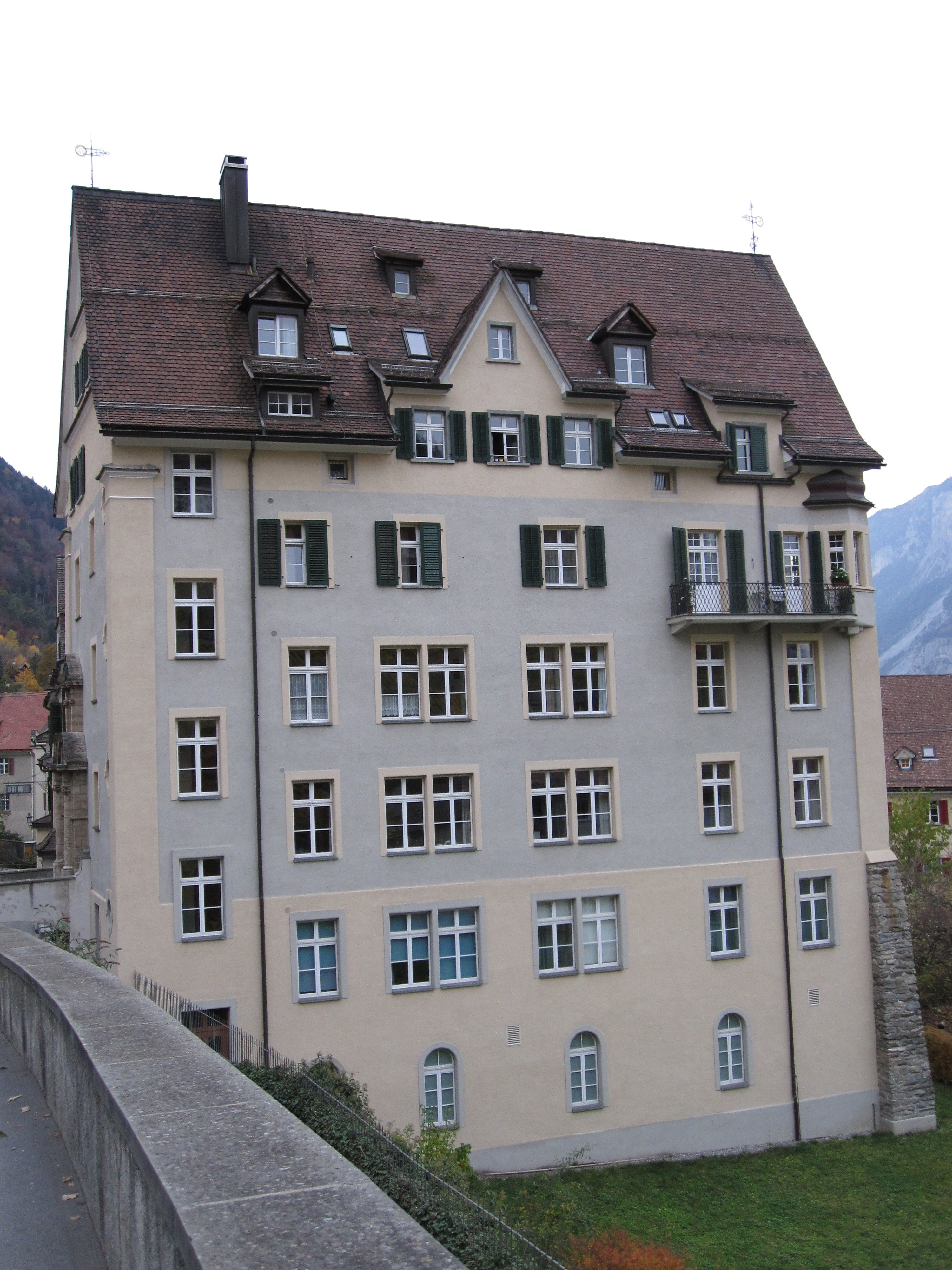 der Marsöl in Chur (Kanton Graubünden, Schweiz), von oben gesehen